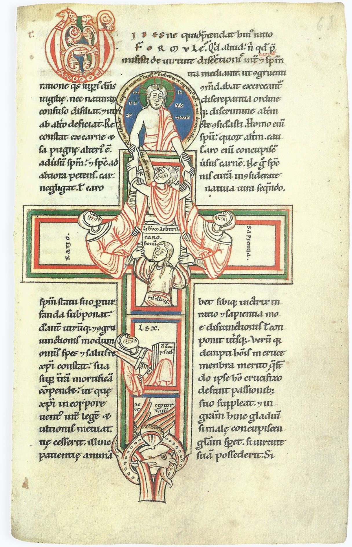 Kampf von Fleisch und Geist (Homo constat ex carne). Speculum virginum Köln Hist. Archiv W 276a Bl. 68r